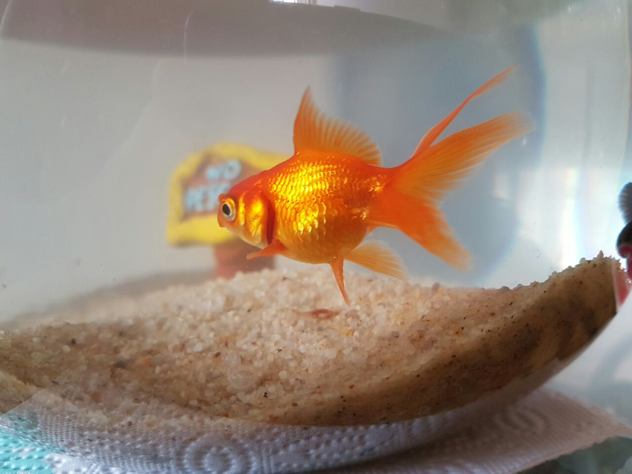 Golden fish